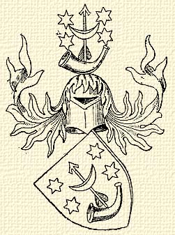 Герб семьи Долгаи